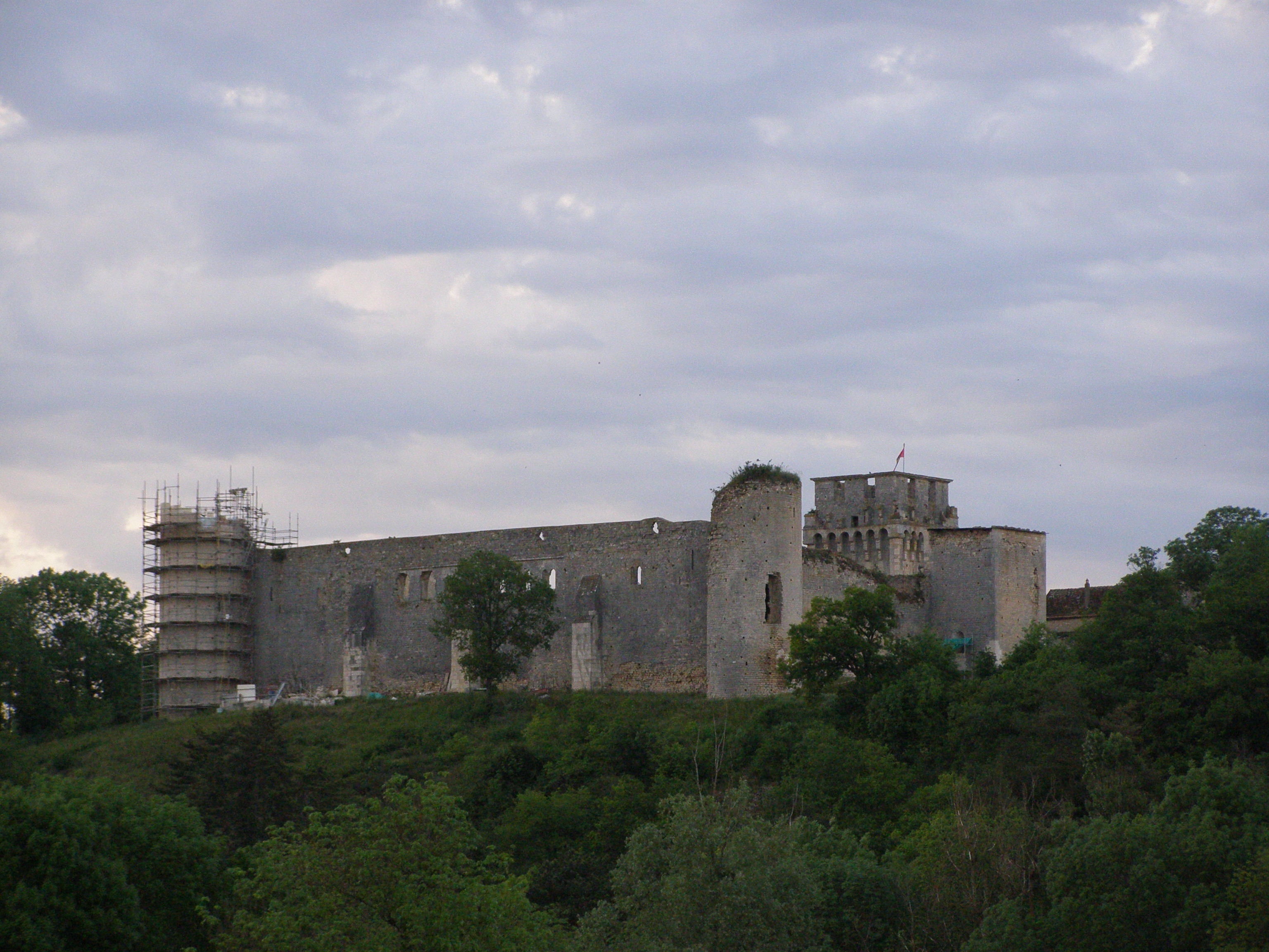 Château-fort de Druyes-les-Belles-Fontaines vu de la vallée